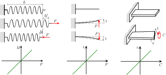 Déformation élastique : exemple des ressorts figure de gauche : ressort à spires non jointives sollicité dans son axe (traction-compression) ; figure du centre : ressort à lame sollicité en torsion longitudinale ; figure de droite : ressort à lame sollicité en torsion autour de son axe.